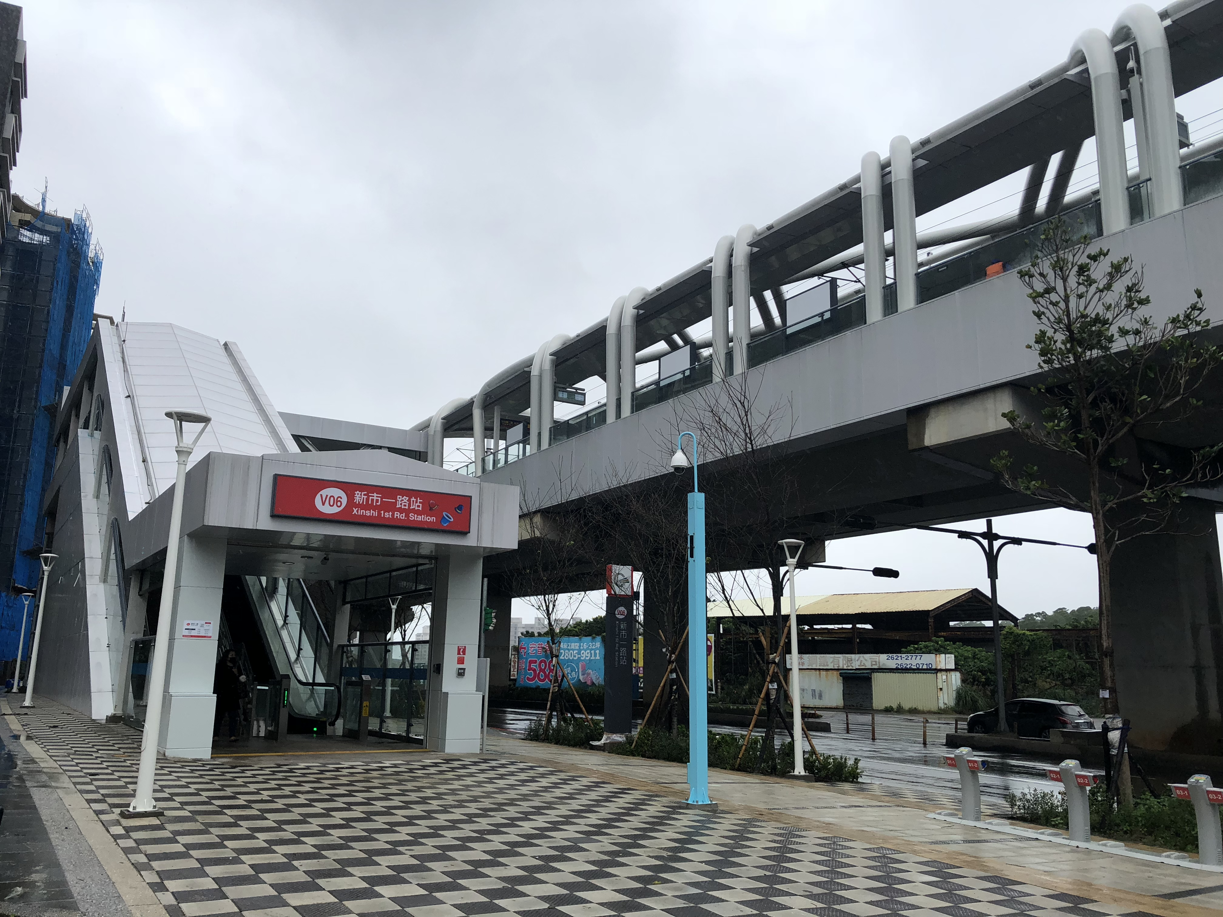 新市一路站